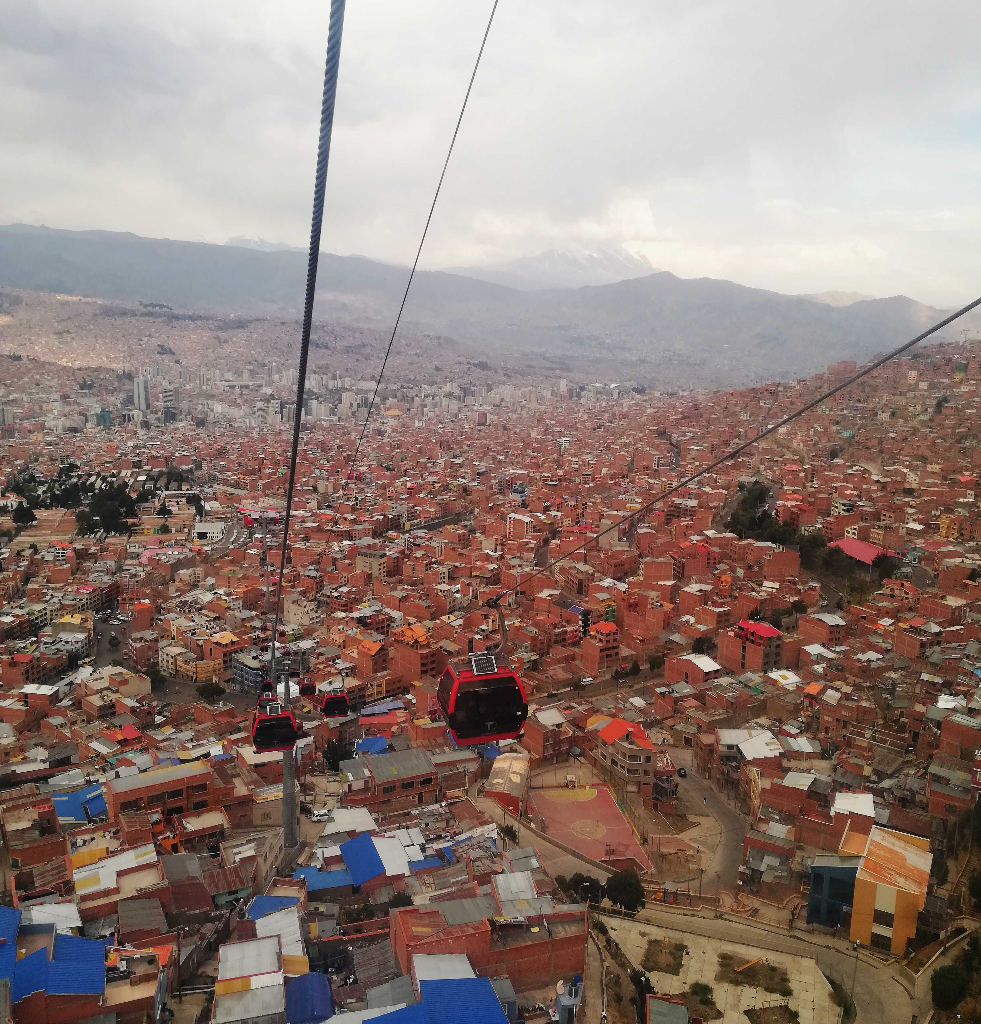 Hochseilbahn in La Paz